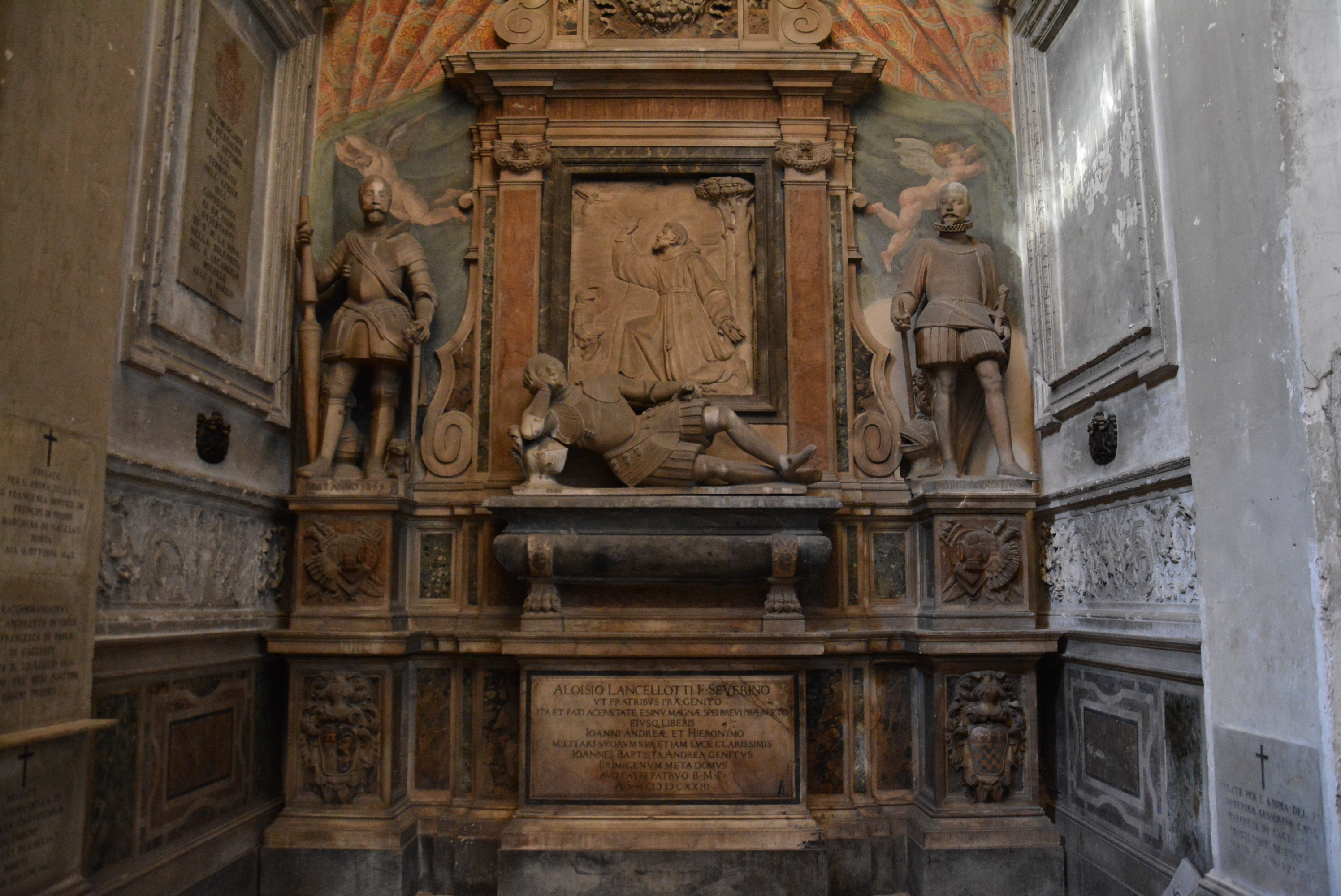 Cappella Sanseverino nella chiesa di Santa Maria la Nova a Napoli